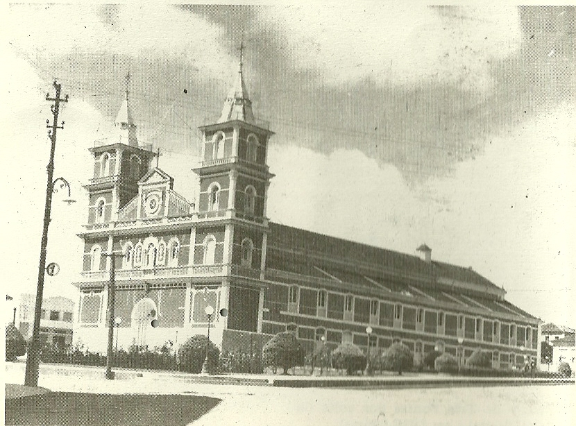 Esta foto mostra como era a Igreja Matriz atualmente.